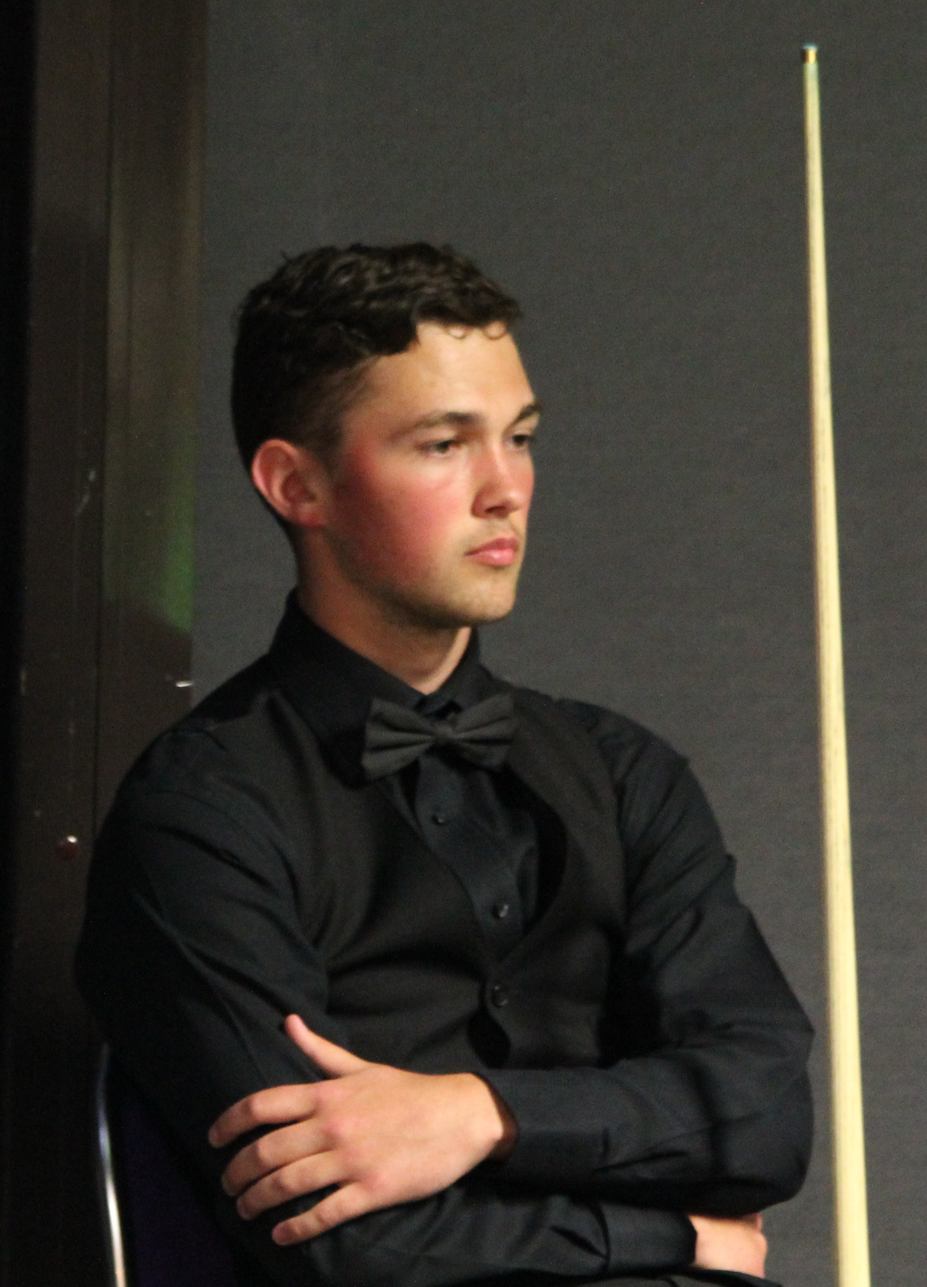 Rhys Clark beim Paul Hunter Classic 2016